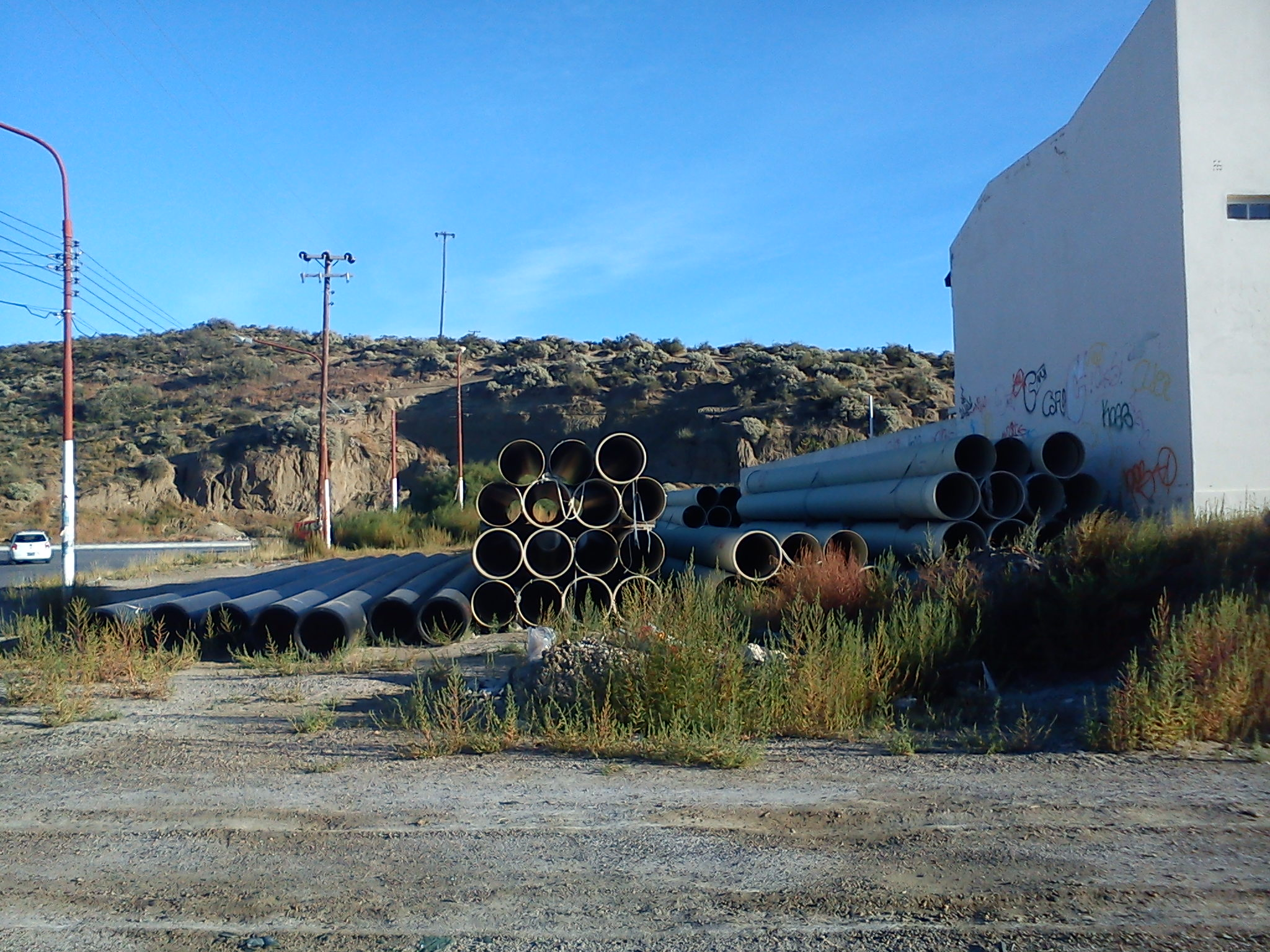 Caños de Acueducto en la ciudad